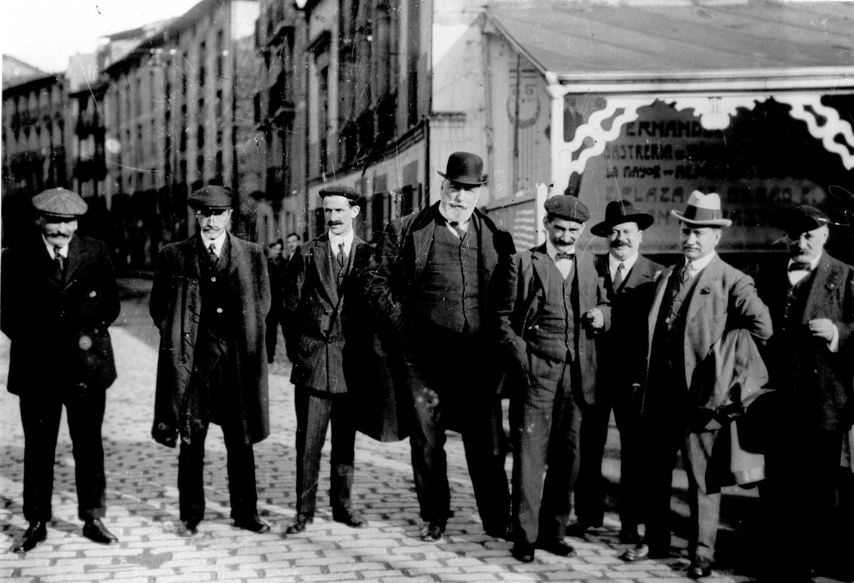 ALCANCE Y CONTENIDO: Junto a Fermín Calbetón, José Ramón Iriondo, juez municipal. NOTAS: En el positivo, en el reverso, manuscrito, de mano del autor "Eibar. D. Fermín Calbetón en Eibar. año 1914", y con sello estampado "OJANGUREN. EIBAR" Localización: Eibar